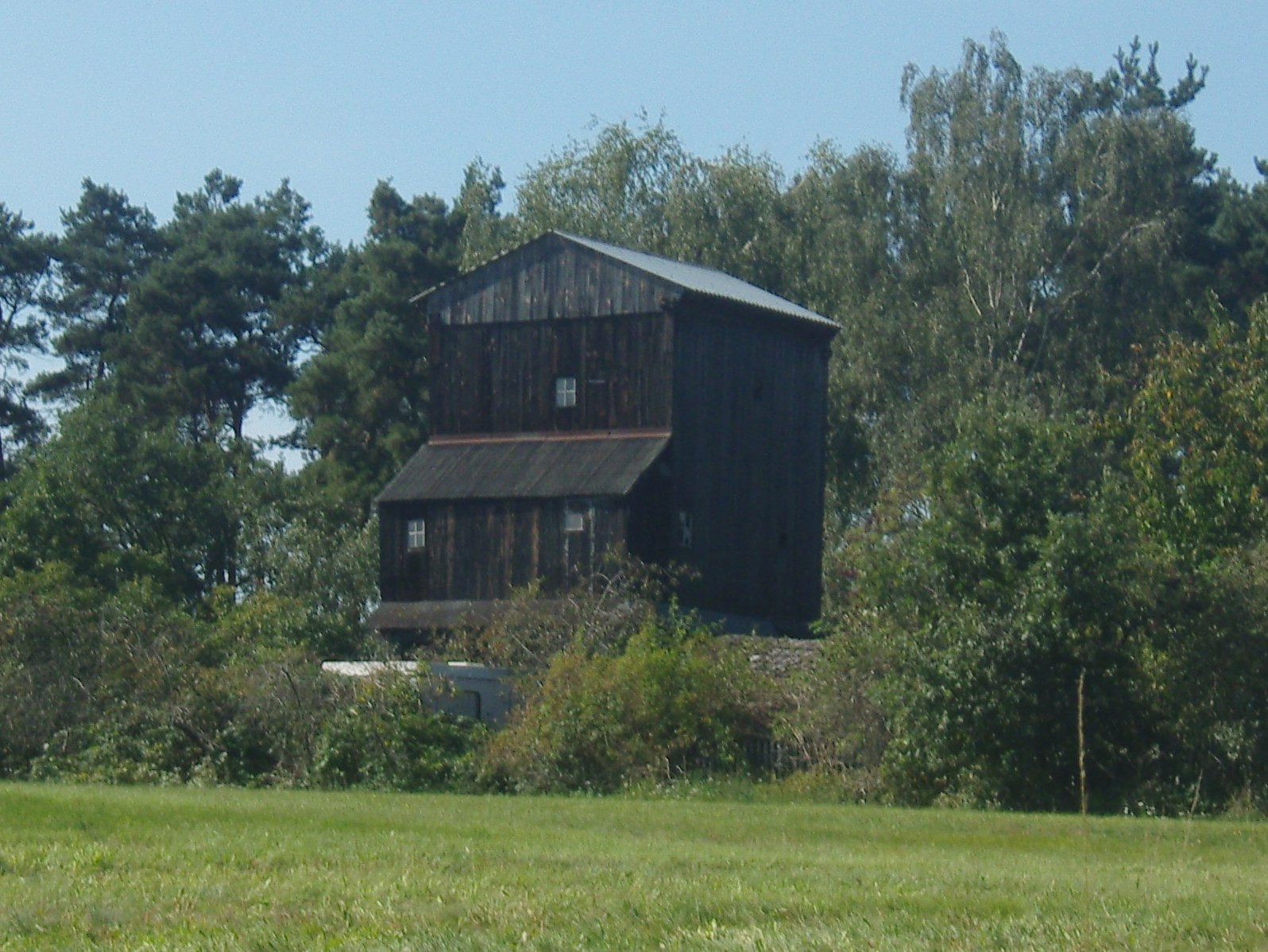 ehemaligen Windmühle in Zwietow, Luckaitztal